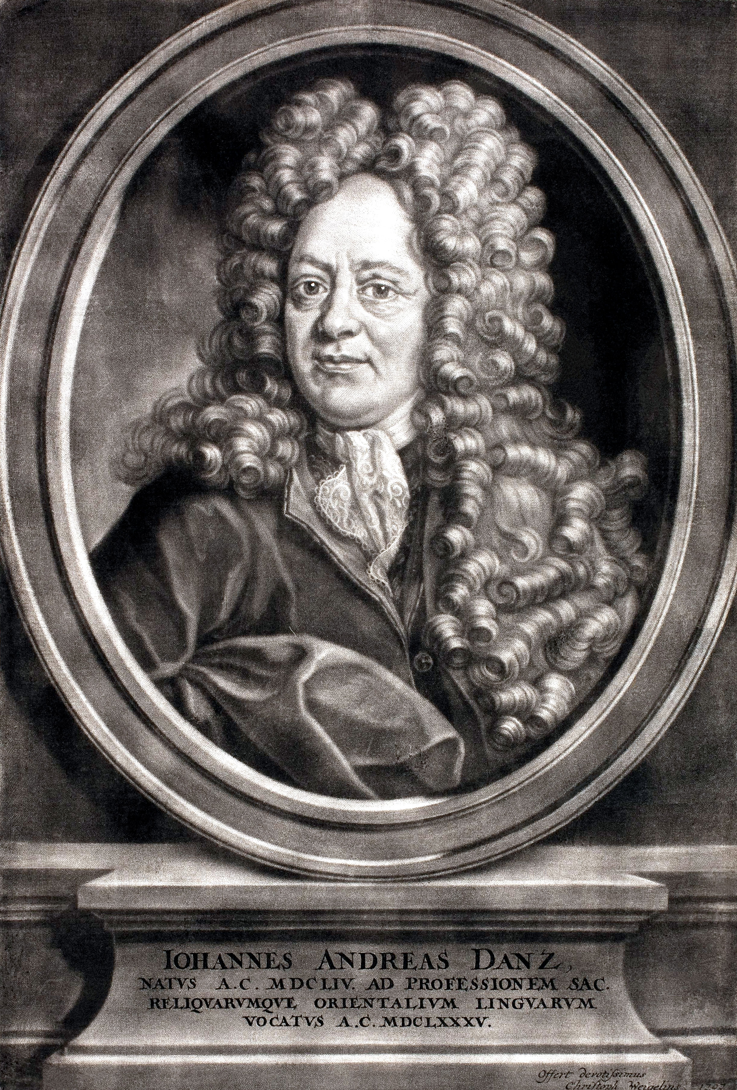 Johann Andreas Danz (1654-1727) deutscher lutherischer Theologe und Orientalist